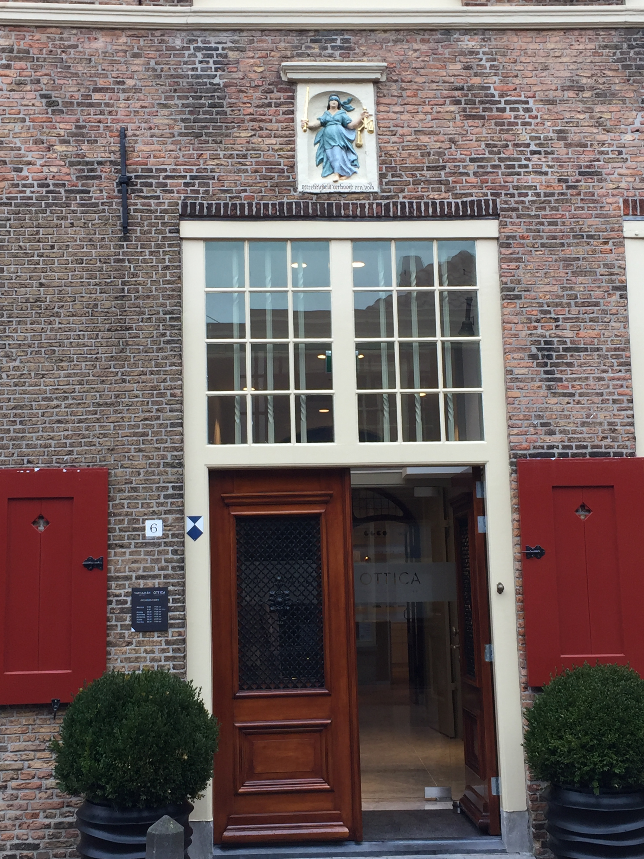 "Rechtvaardigheid verhoogt een volk" (Spreuken 14: 34). Sculptuur boven de ingang van het voormalige raadhuis in Naaldwijk, Herenstraat 6 in Naaldwijk (Westland)